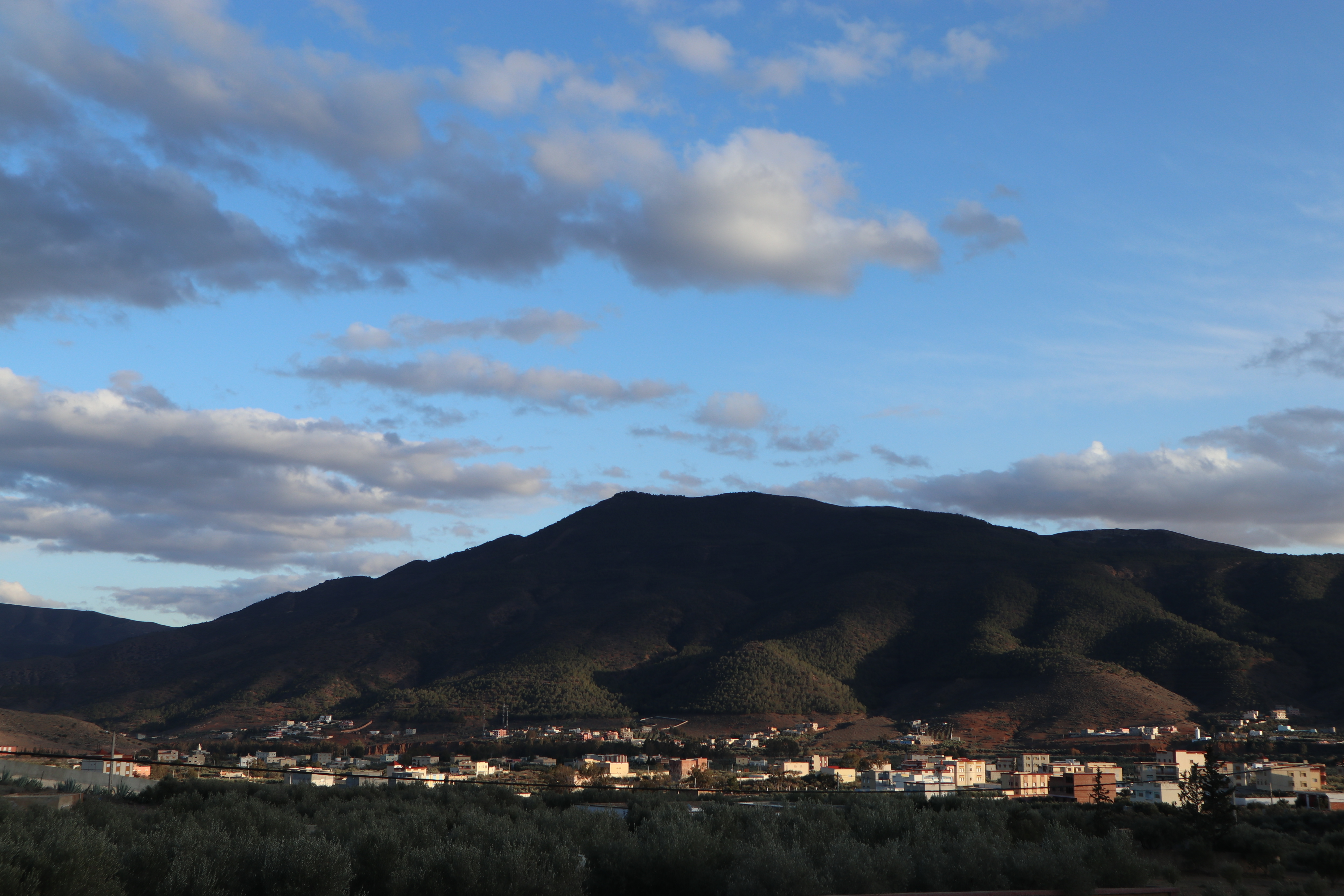 Le Douar (2020)